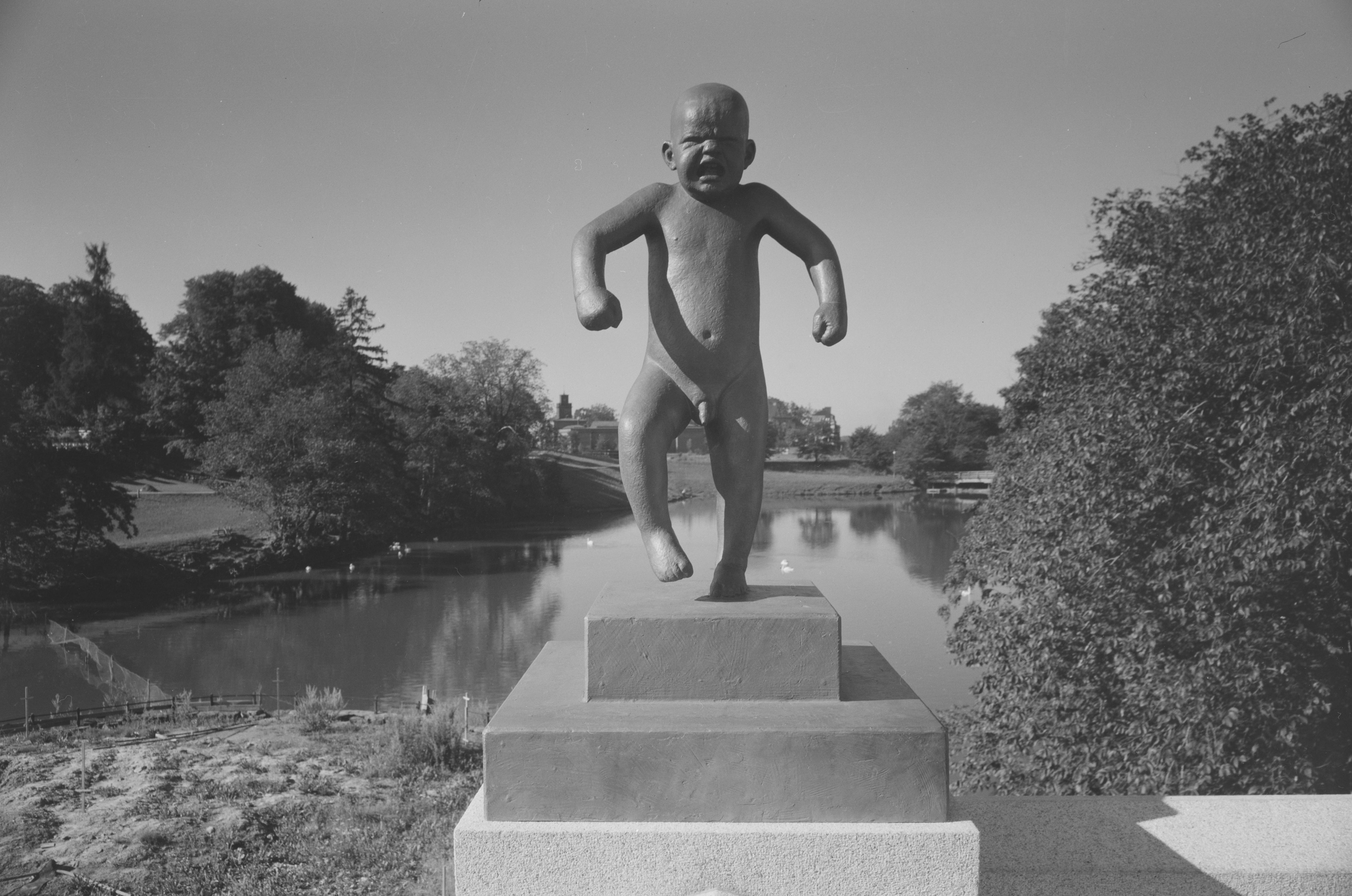 Bildet er hentet fra Nasjonalbibliotekets bildesamling. Anmerkninger til bildet var: Fotograf : ukjent «Sinnataggen» i Vigelandsanlegget i Frognerparken i Oslo.